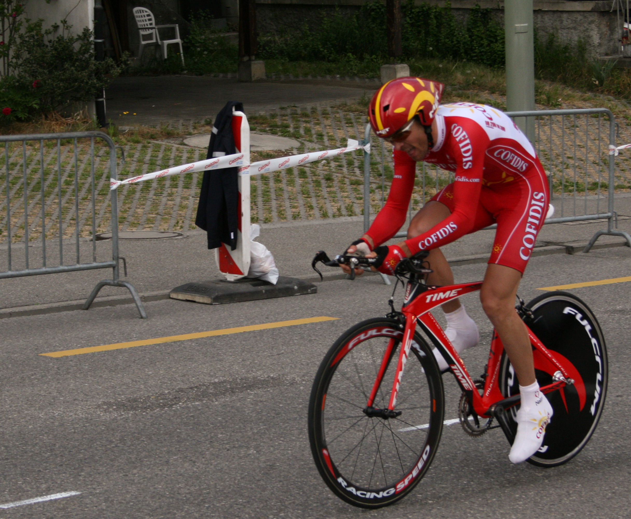 Frédéric Bessy prologue du Tour de Romandie 2007